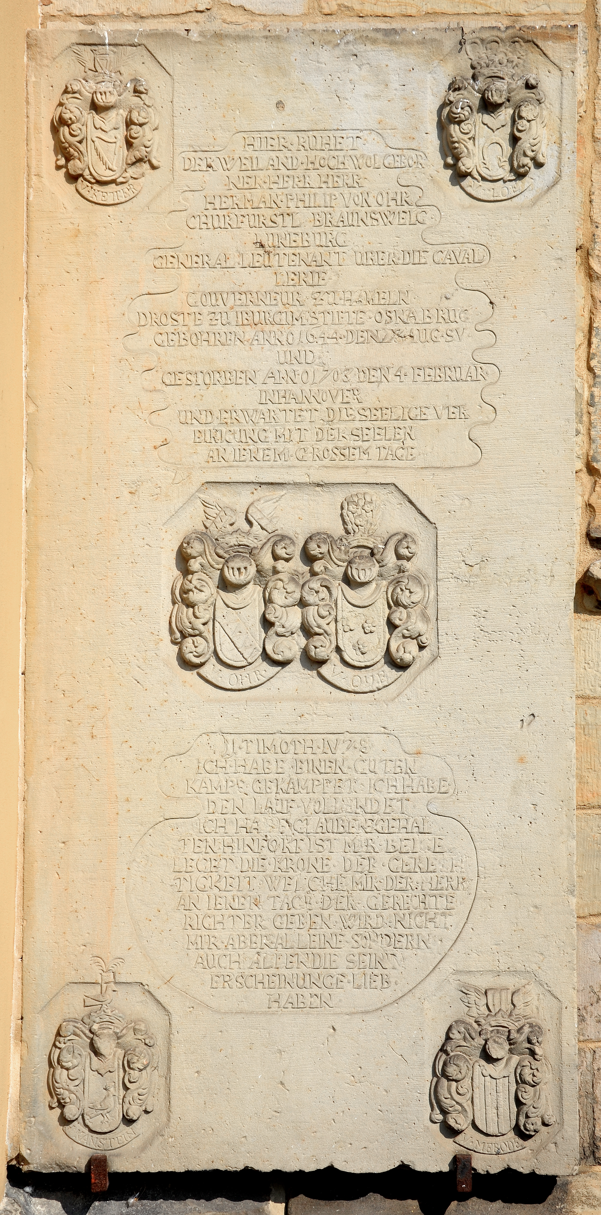 Grabstein (heute Epitaph) an der südlichen Aussenmauer der Neustädter Hof- und Stadtkirche St. Johannis in Hannover, Stadtteil Calenberger Neustadt, für den Kurfürstlich Braunschweigischen Generalleutnant über die Kavallerie Hermann Philipp von Oer (hier als Ohr geschrieben), Militärgouverneur über die Festung Hameln, Drost zu Iburg im Hochstift Osnabrück, geboren am 27. August 1644 auf dem Rittergut Bruche (heute in Eicken-Bruche), gestorben am 4. Februar 1703 in Hannover. Im Zentrum der Grabplatte finden sich die Wappen der Adelsgeschlechter von Oer und, oben links das der Familie von Ketter, rechts daneben dasjenige derer von Loë. Unten links findet sich das Wappen der Geschlechts (Rabe) von Kanstein, rechts daneben das des Hauses von Merode ...